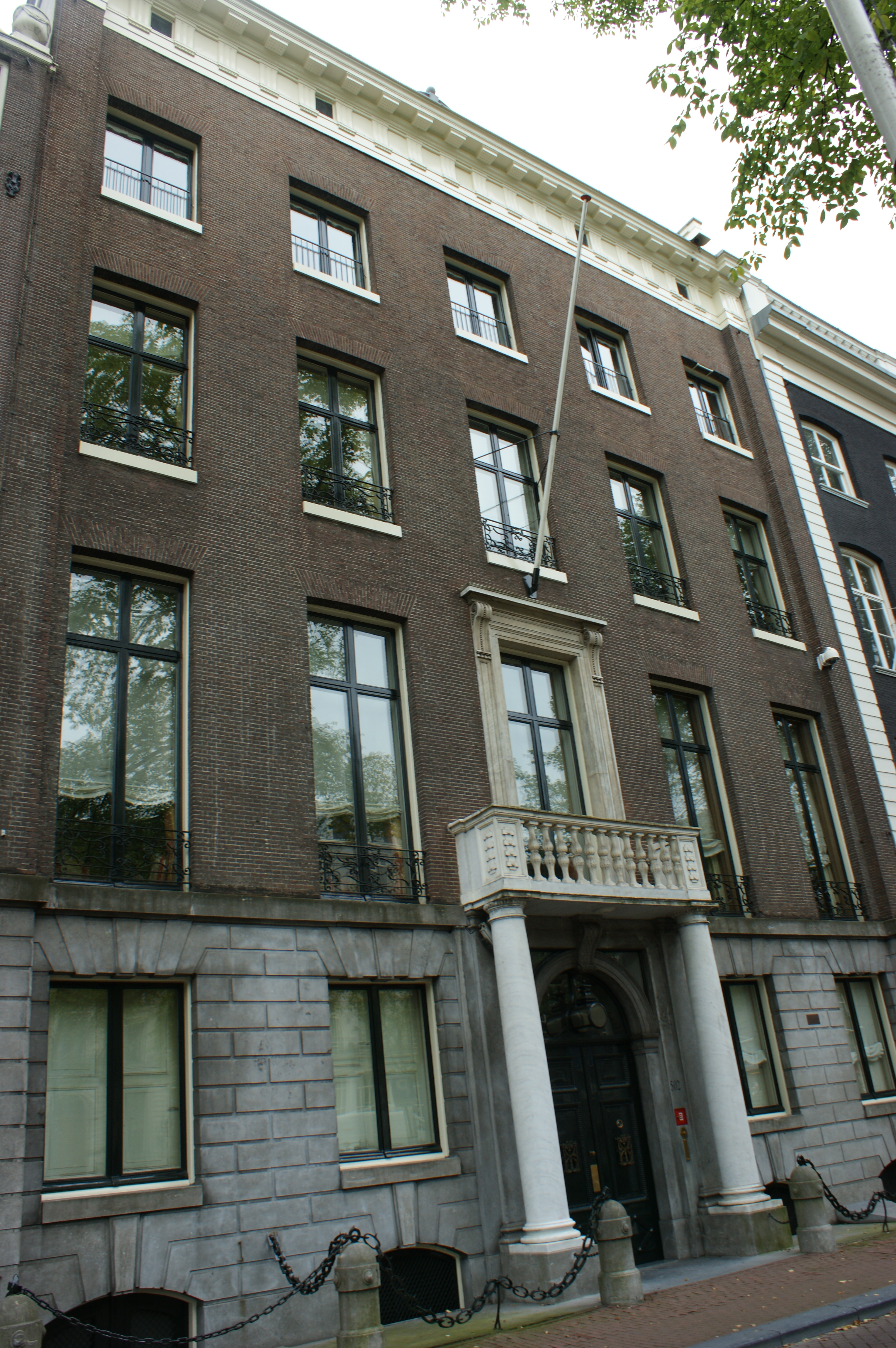 Amsterdam, Herengracht